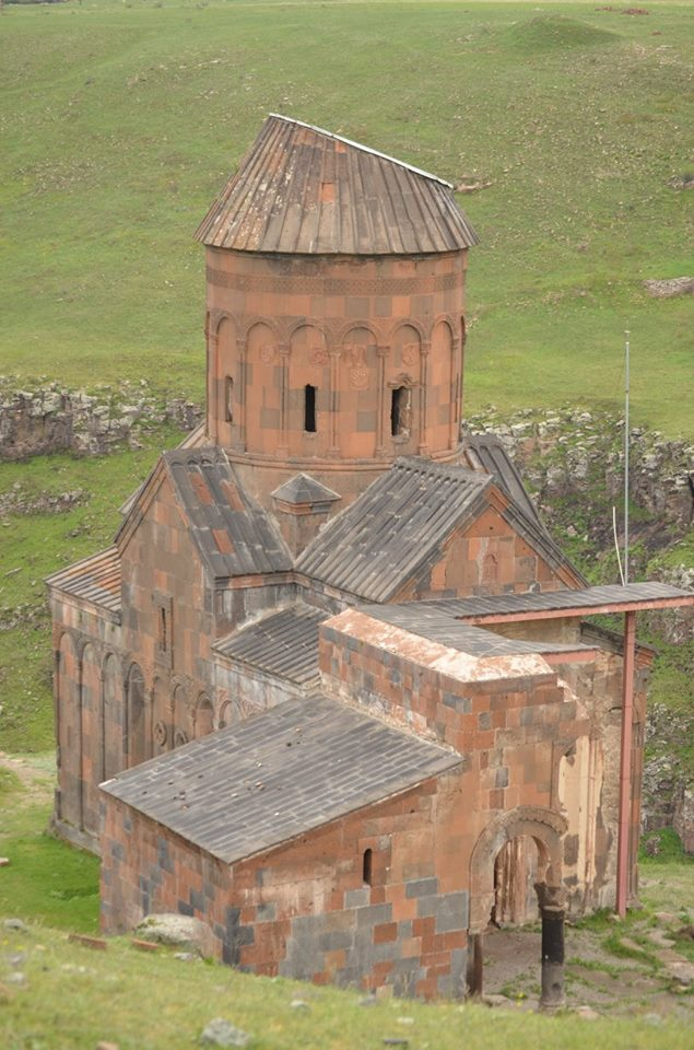 ანისის წმინდა გრიგოლ განმანათლებლის ეკლესია